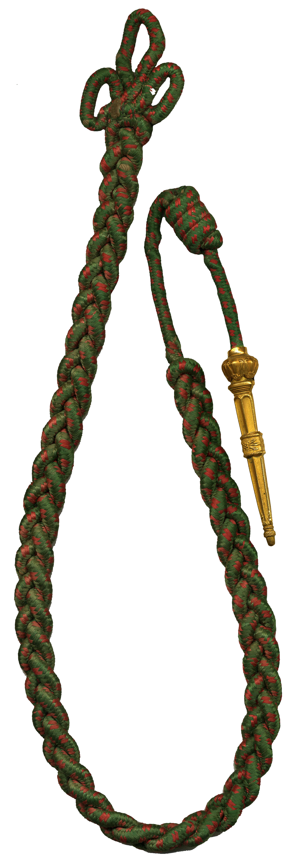 Fourragère aux couleurs de la Croix de guerre